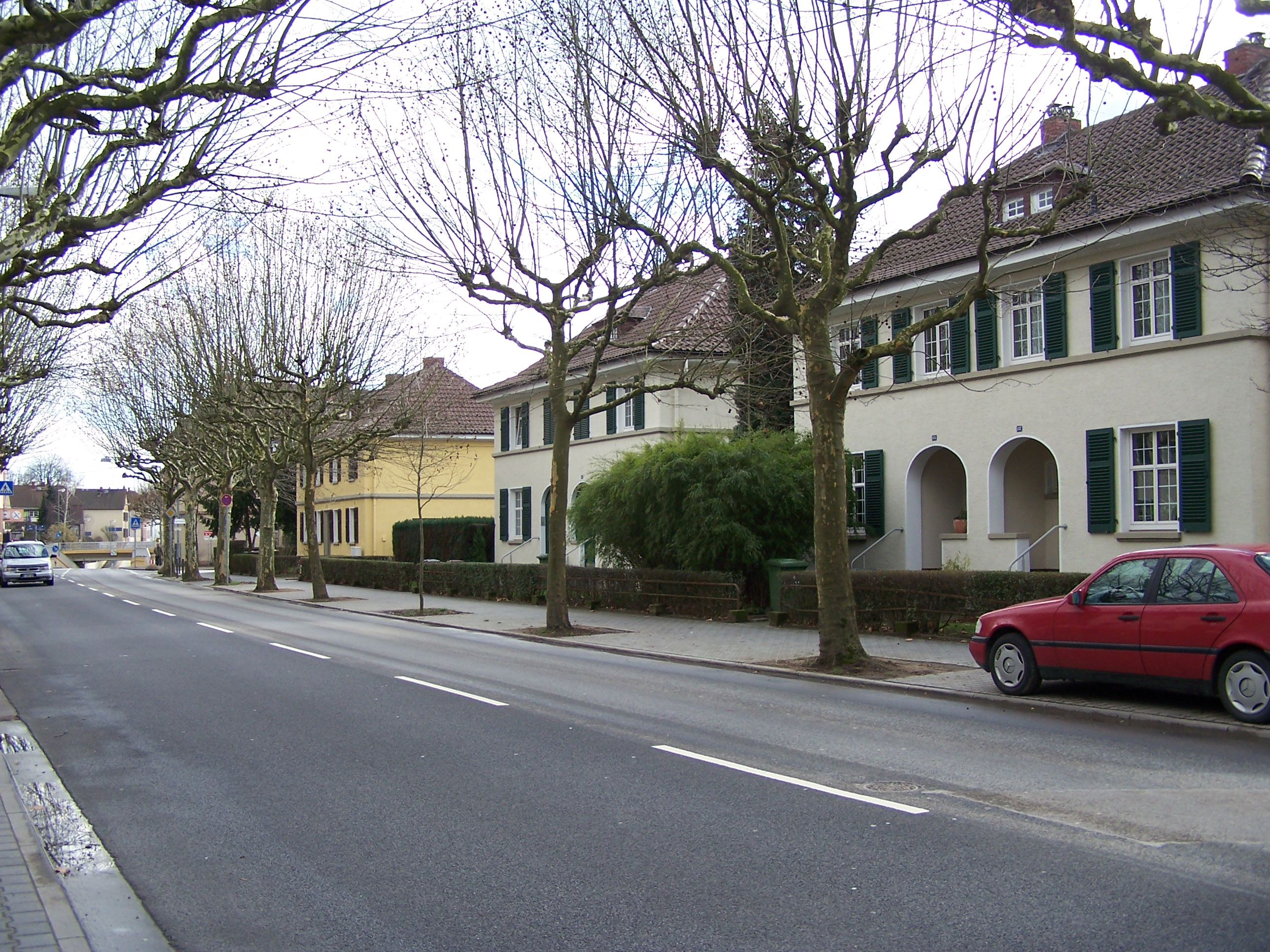 Nördliche Sindlinger Bahnstraße mit Häusern aus den 1920er Jahren, im Hintergrund der Bahnhof Sindlingen.